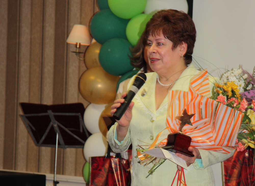 Главный врач Детского областного противотуберкулёзного санатория «Родничок» города Кадников Ирина Смирнова получает "Звезду надежды". 2010 год, Вологда